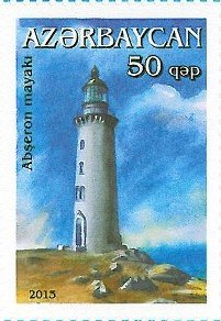 Lighthouses of Azerbaijan. N 1083 - 50 qapik. There are pictured Absheron lighthouse on the stamp.